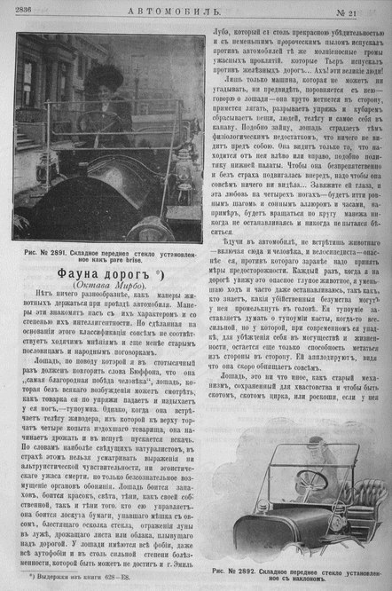 Traduction russe de La Faune des routes, chapitre de La 628-E8, d'Octave Mirbeau (1848-1917).